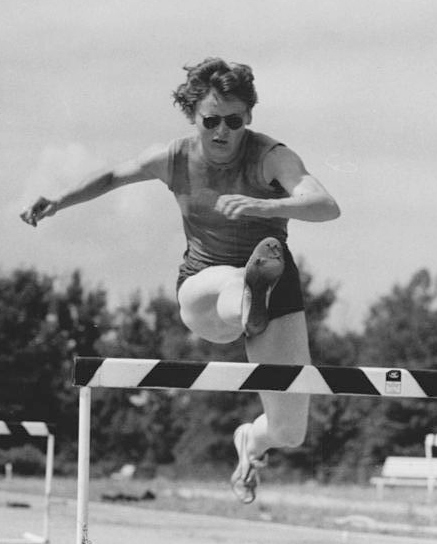 Gisela Birkemeyer Zentralbild Brüggmann Stu-Brü-Qu 7.8.1960 DDR-Sportler zur Olympiade 1960 nach Rom Gisela Birkemeyer, 28 Jahre alt, Leutnant der Deutschen Volkspolizei, Stadtverordnete von Groß-Berlin und Hausfrau wird als Favoritin im 80-m-Hürdenlauf bei den Olympischen Spielen in Rom die Deutsche Demokratische Republik vertreten. 1956 erkämpfte sie bei der Olympiade in Melbourne im 70-m-Hürdenlauf die Silbermedaille. Seit 1951 trainiert sie unter der Anleitung von Heinz Birkenmeyer, der seit 3 Jahren ihr Ehemann ist. Ihre Spezialdisziplin ist 100 m und 200 m Lauf, sowie 80-m-Hürdenlauf. Seit 1952 hat Gisela Birkemeyer erfolgreich an über 1000 Wettkämpfen teilgenommen. Unter anderem errang sie 53 Einzelsiege und war an 17 Länderkämpfen beteiligt. Im Juli 1960 stellte sie mit 10,5 Sek. einen Weltrekord im 80-m-Hürdenlauf auf. UBz: Im 80-m-Hürdenlauf errang Gisela Birkemeyer bei der Olympiade in Melbourne den 2. Platz. Aber nur ausdauerndes Training kann die guten sportlichen Ergebnisse halten und noch weiter verbessern.